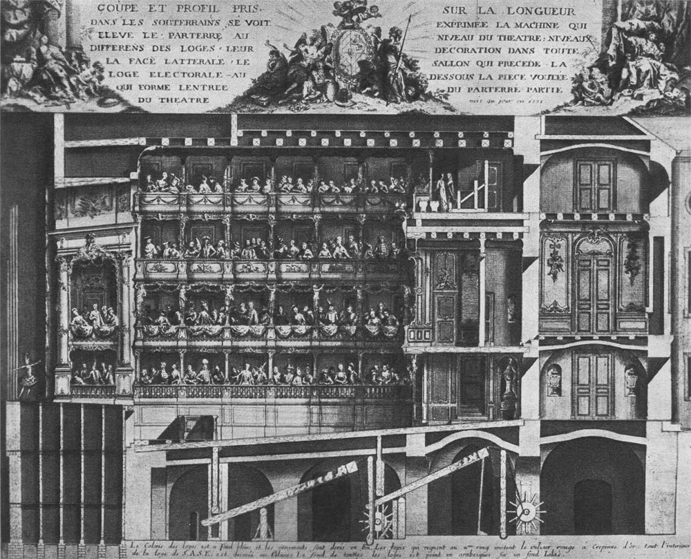 München, Schnittansicht des Königlichen Residenztheaters (Cuvilliés-Theater). Zu sehen sind die mechanischen Vorrichtungenm mit denen der Bühnenboden gehoben wurde.